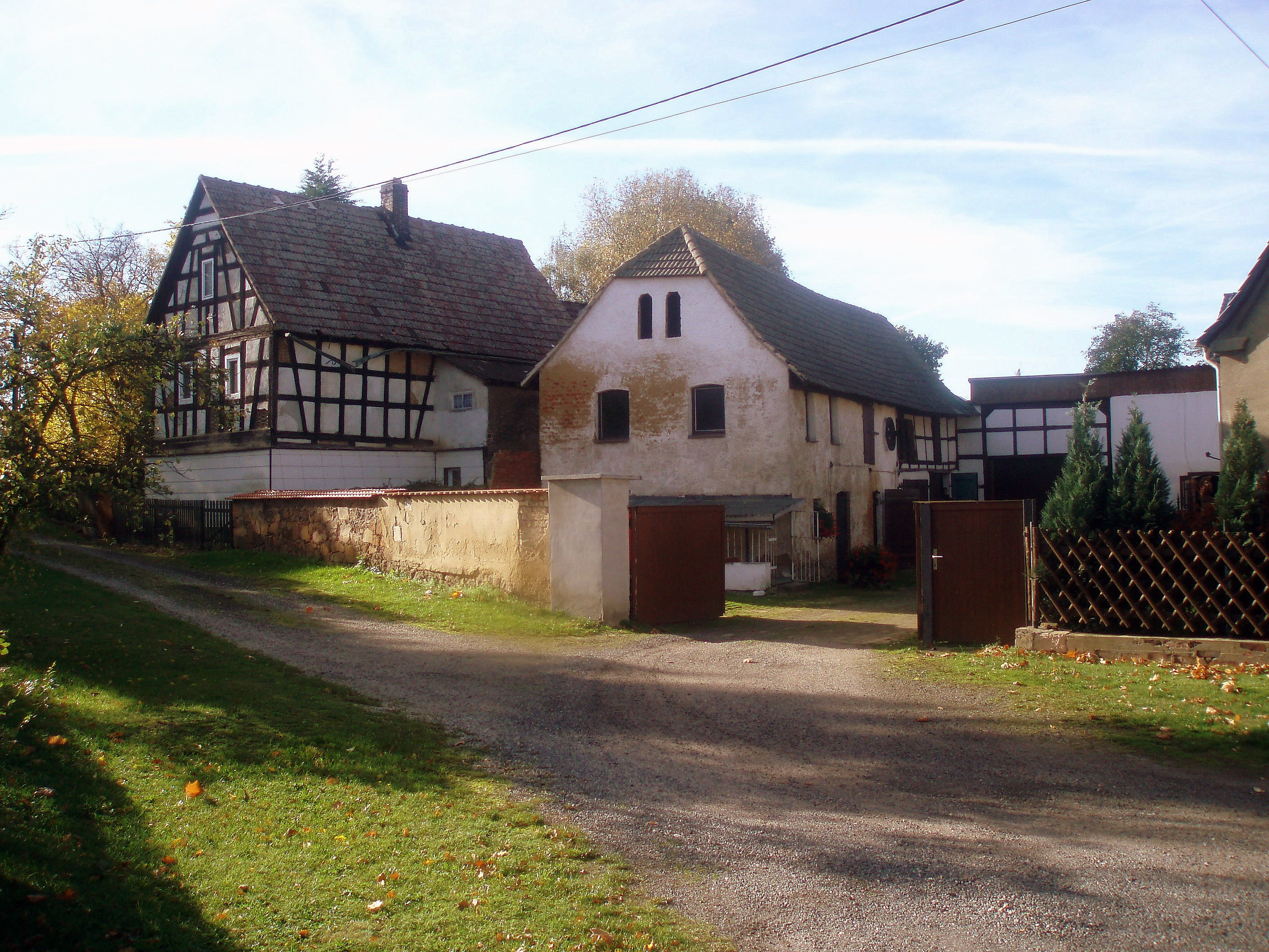 Dorfbild Heuersdorf.